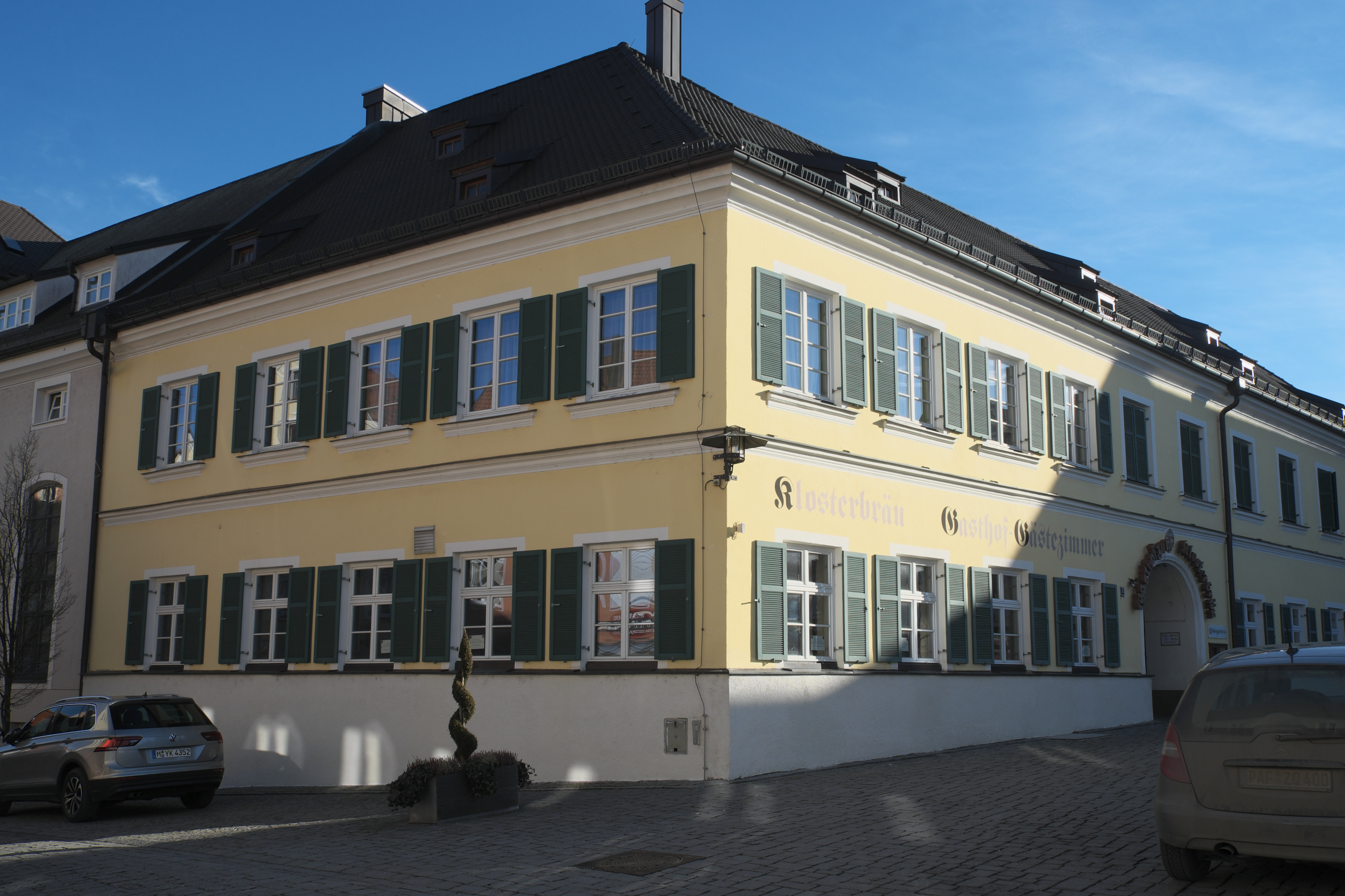 Klosterbräu am Stadtplatz 3 in Geisenfeld im Landkreis Pfaffenhofen an der Ilm (Bayern/Deutschland)